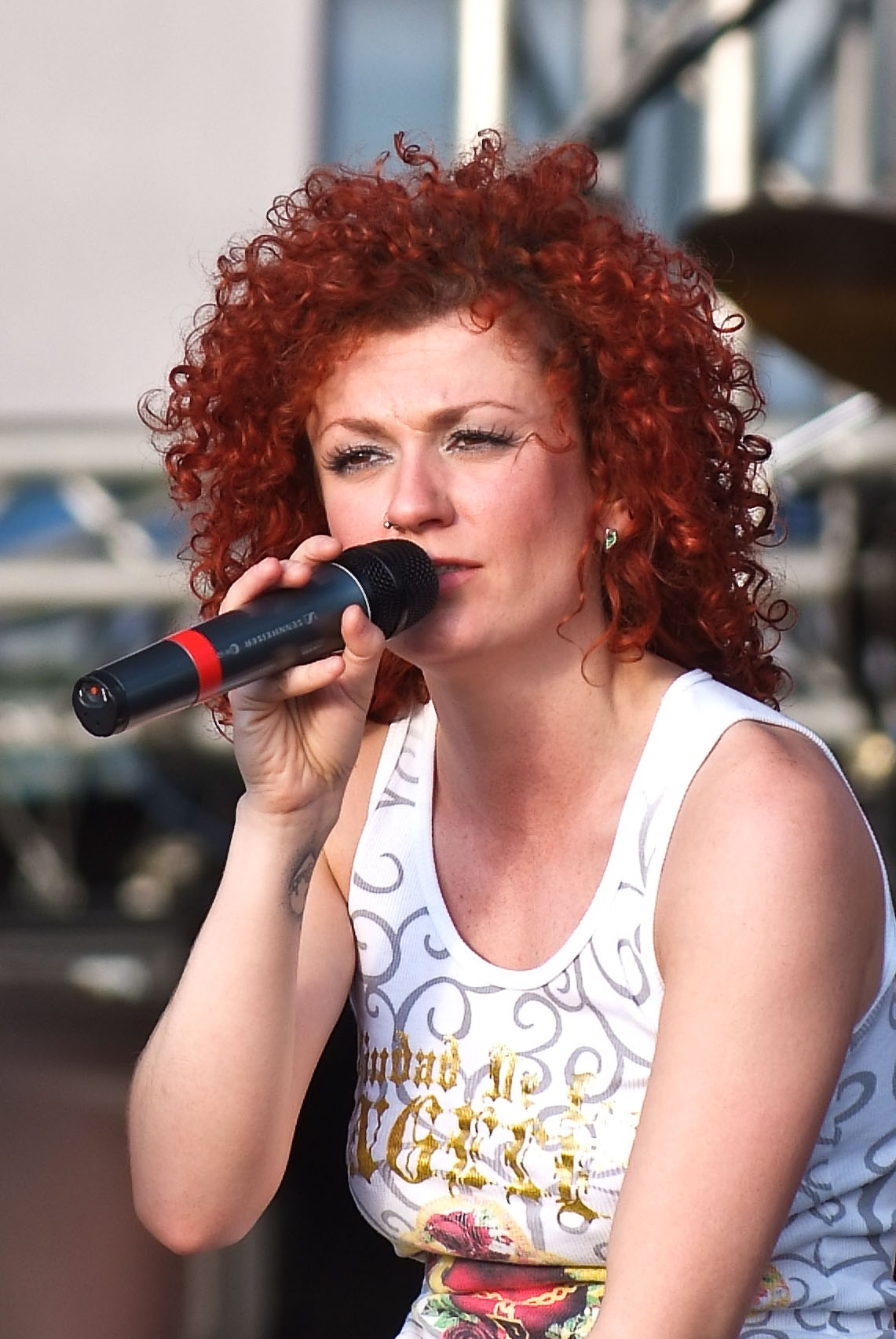 Lucy Diakowska of No Angels